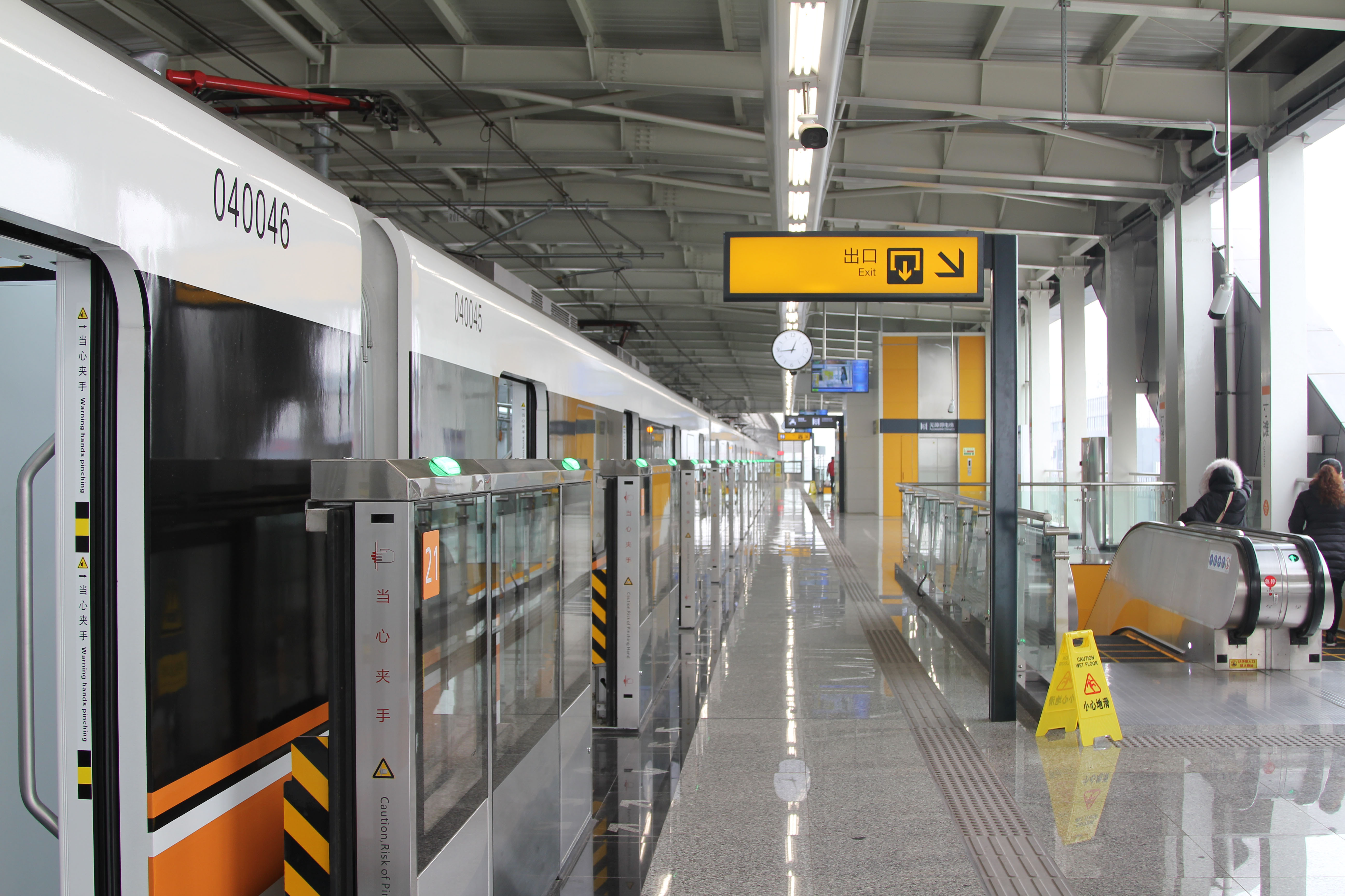 中文（中国大陆）: 4号线寸滩站站台